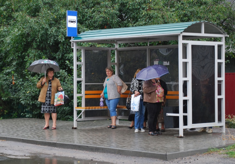 Зупинка по вулиці Незалежності в Іллінцях